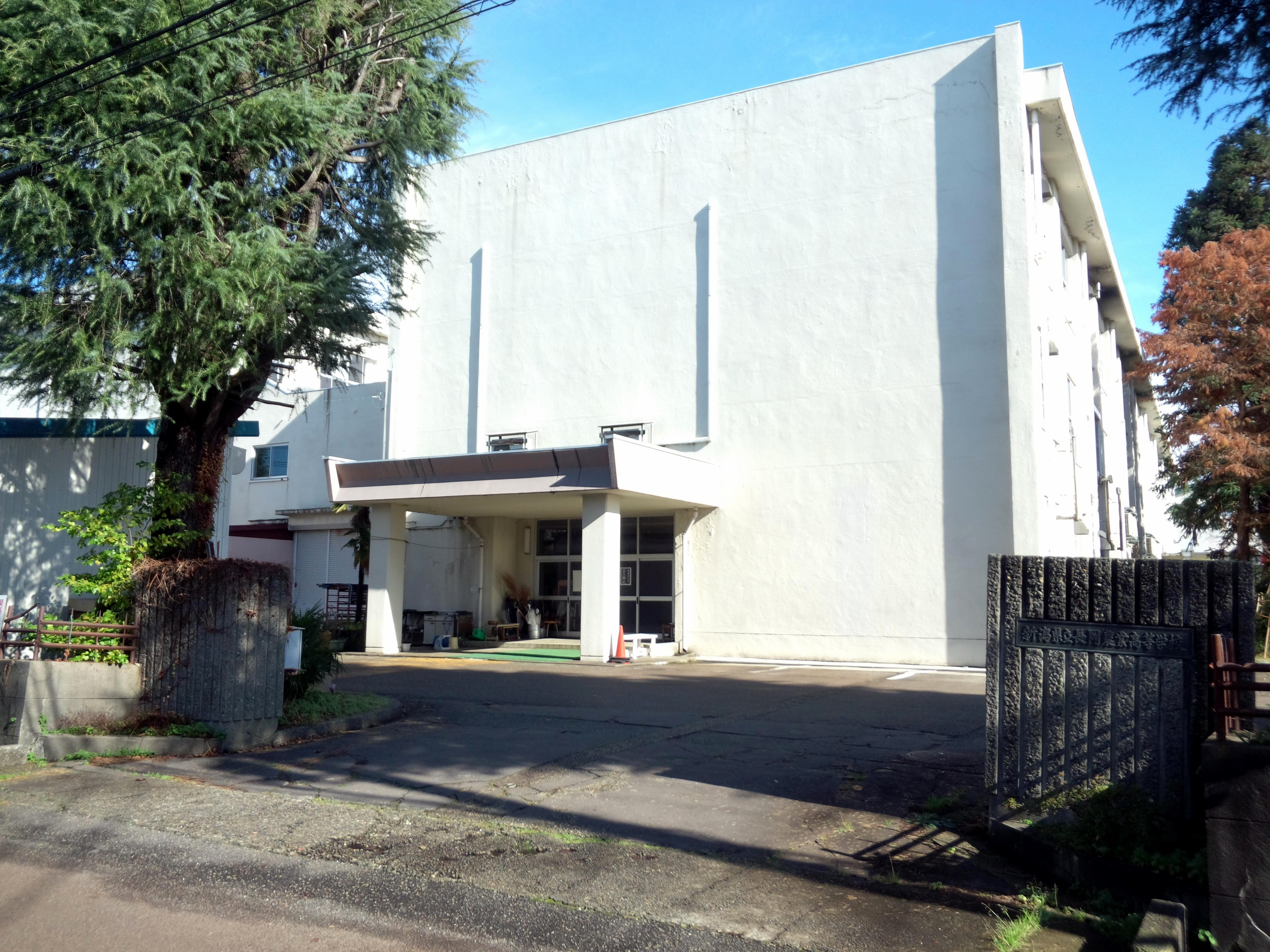 新潟県立長岡農業高校の校門